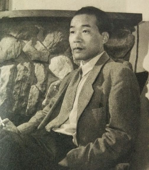 吉岡力